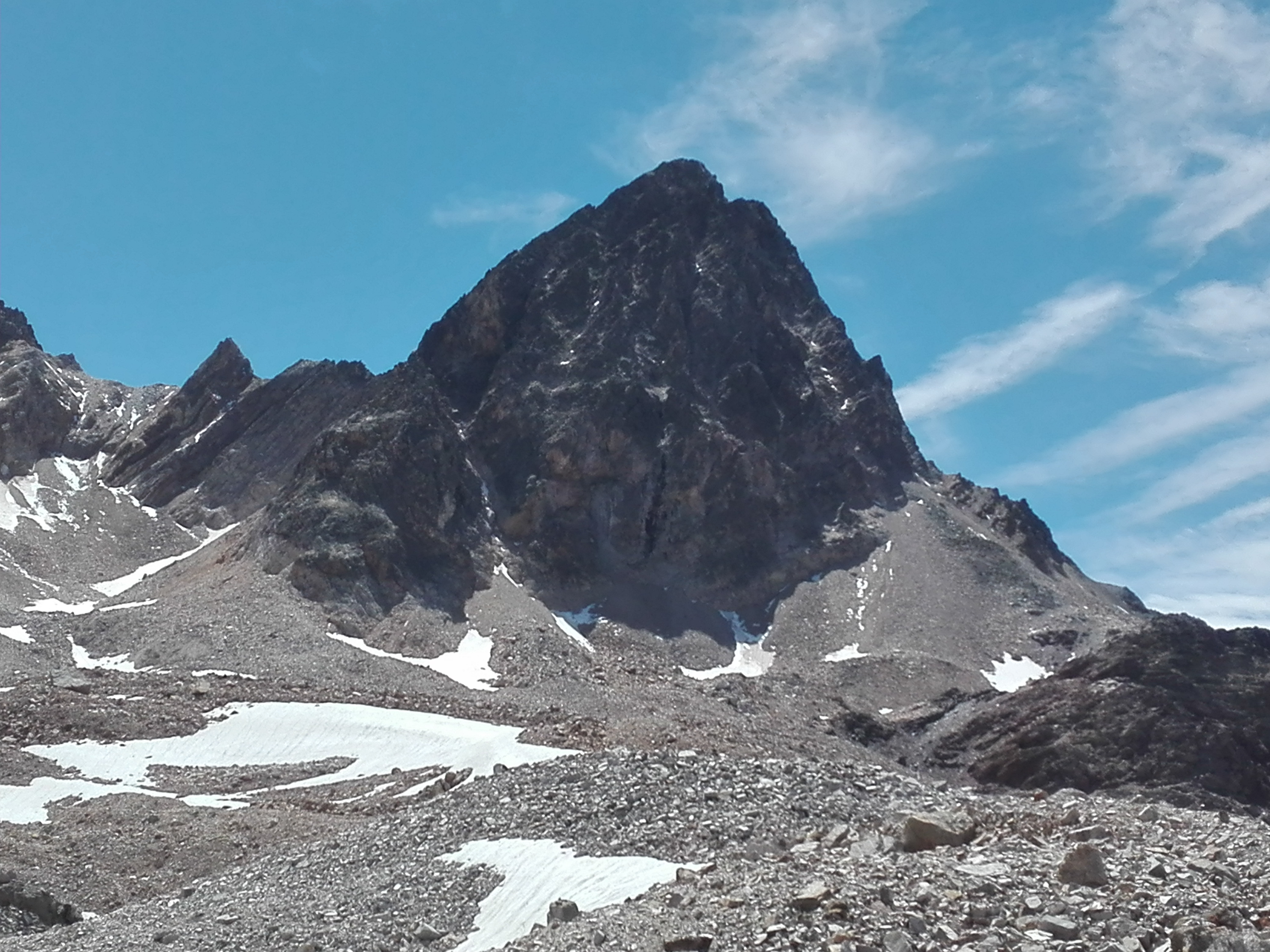 Il Pic du Thabor. A sinistra il Col du Thabor che lo collega con il Monte Thabor.